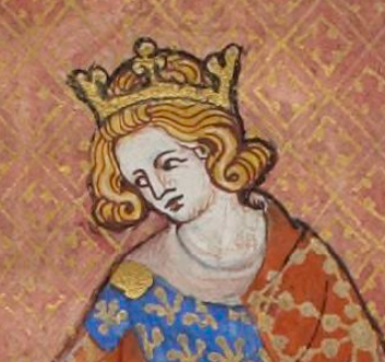 Ludvík X.